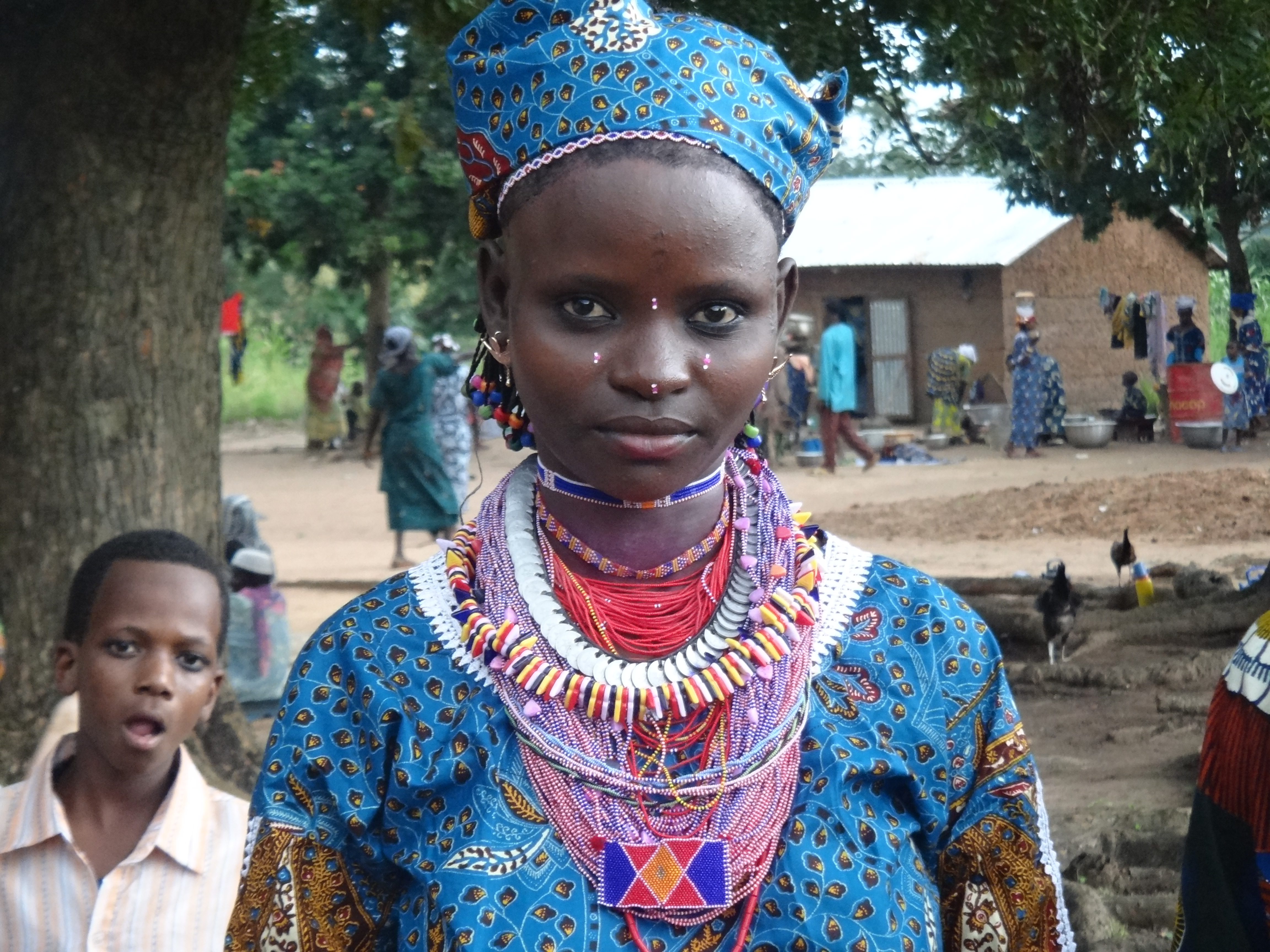 Femme peul du Bénin habillée pour une cérémonie de mariage This is an image of Cultural Fashion or Adornment from Benin